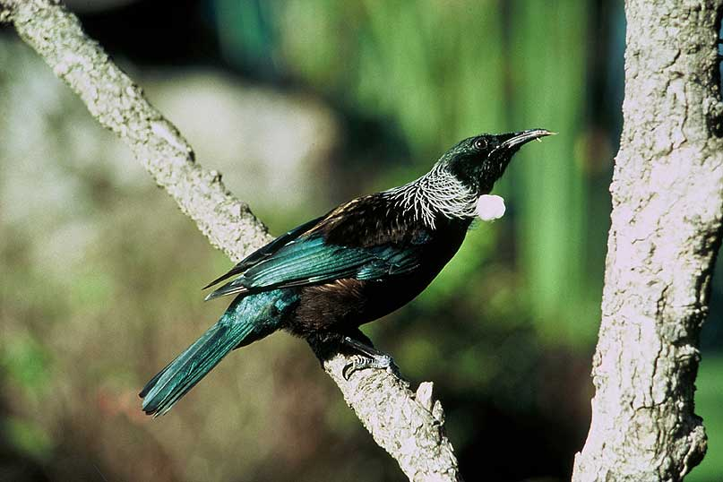 Prosthemadera novaeseelandiae